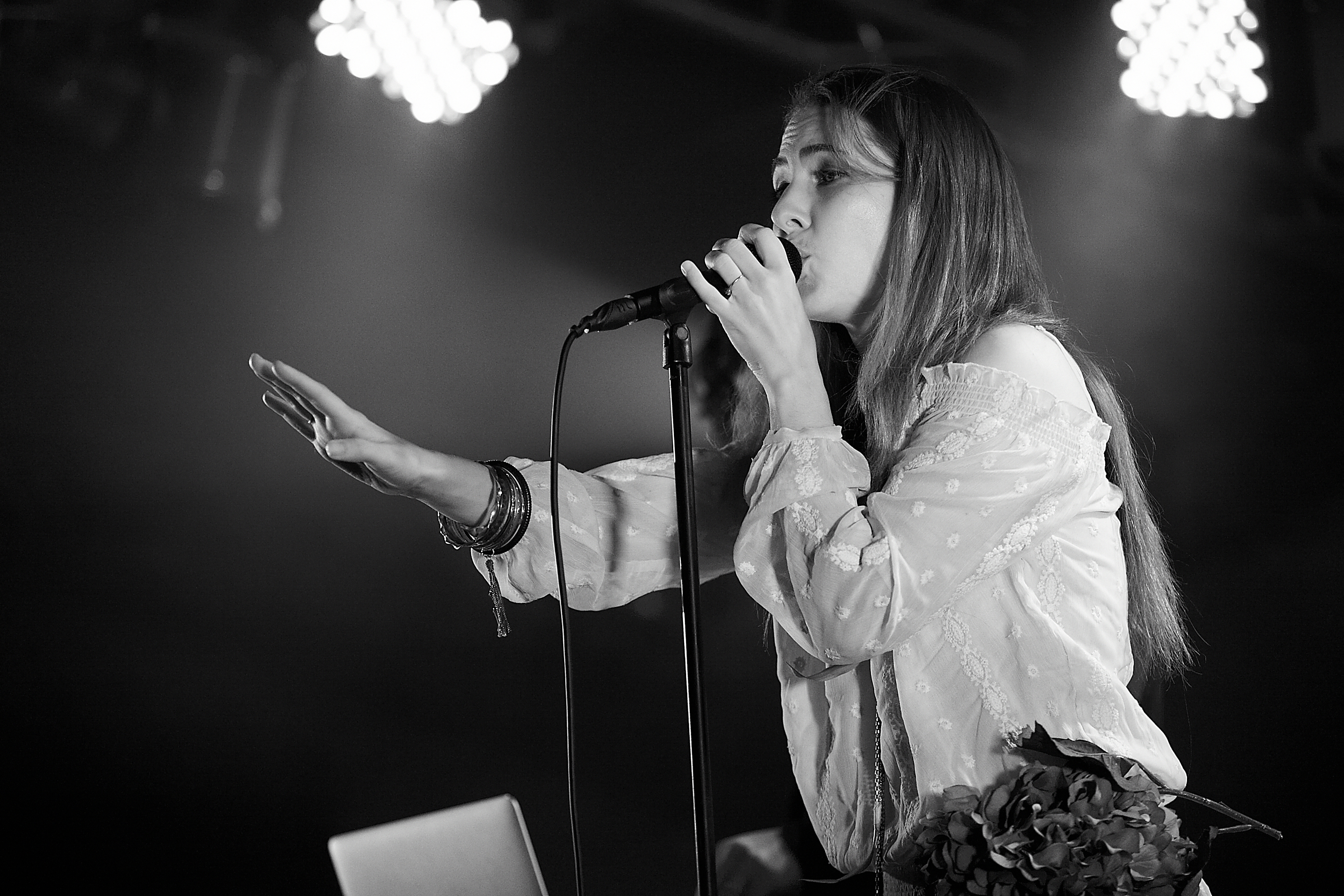 Mavie Marcos. Концерт Andain в России, Санкт-Петербурге, клубе "Зал ожидания" - 02.03.2013